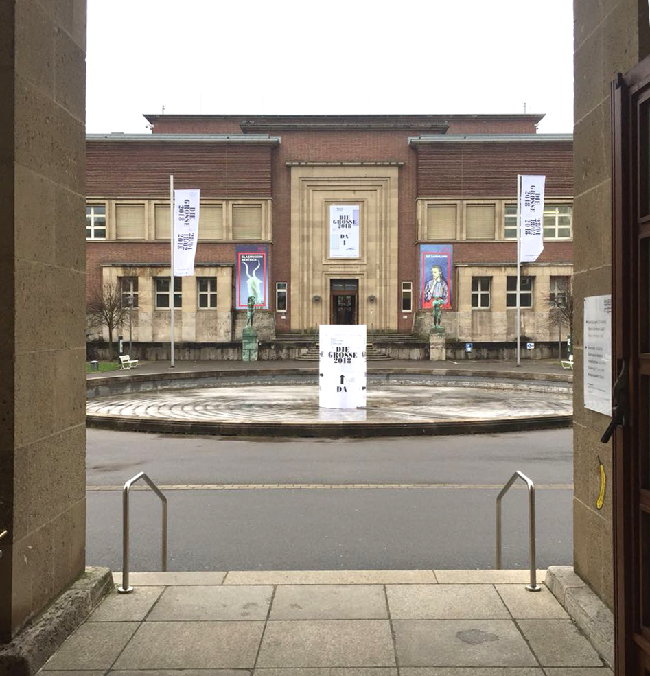 Die Grosse im Museum Kunstpalast, Januar 2018, Sicht vom Eingang Ausstellungsflügel zum Sammlungsflügel